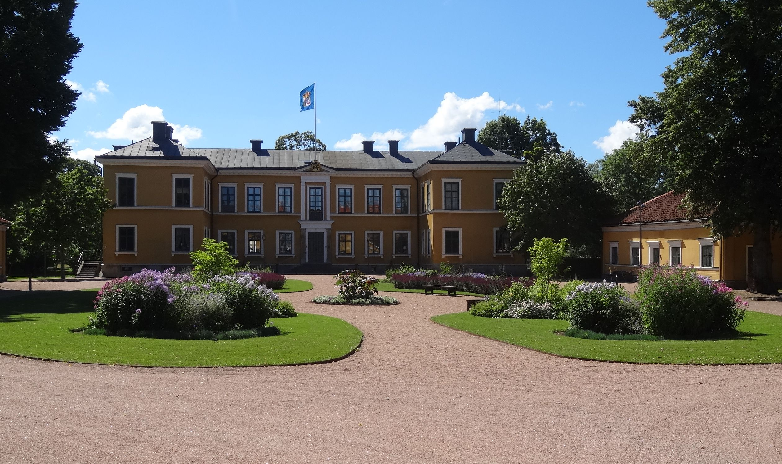 Marieholms kungsgård, Mariestad. Tidigare residens för landshövdingarna i Skaraborgs län.